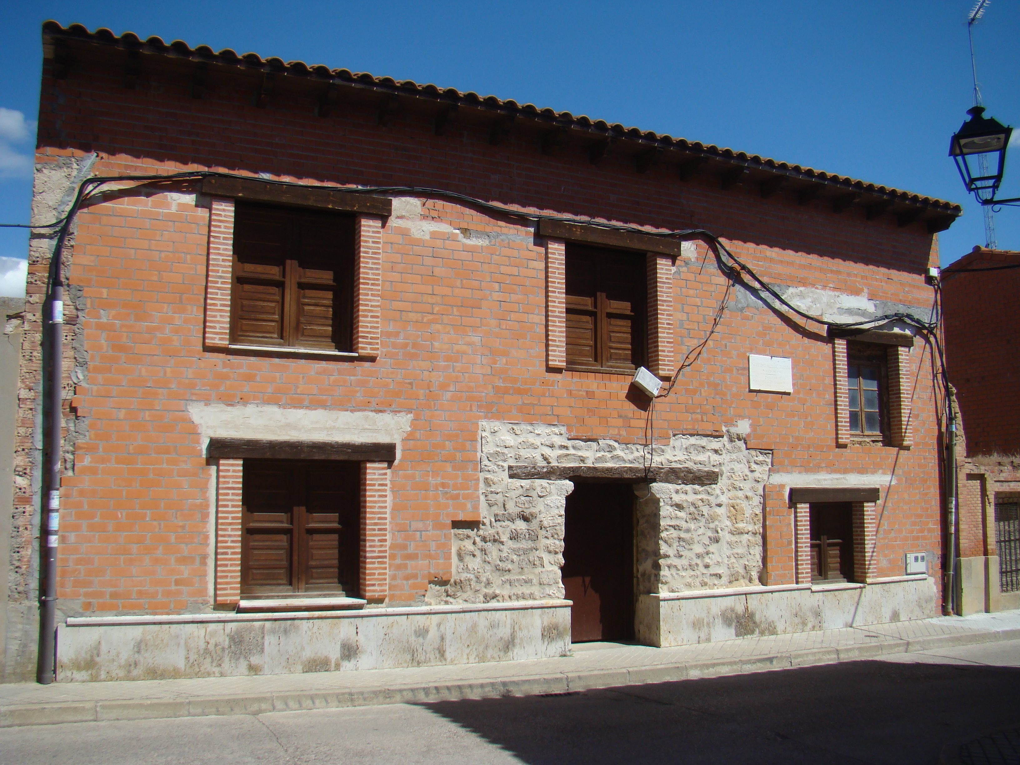 Casa en la calle de fray Antonio Alcalde en Cigales (Valladolid, España). En esta casa vivió fray Antonio que sería años más tarde obispo en Yucatán y Guadalajara de México.